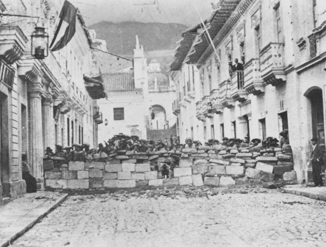 Rivadeneira, Benjamin: Barrikade während Straßenschlachten in Quito